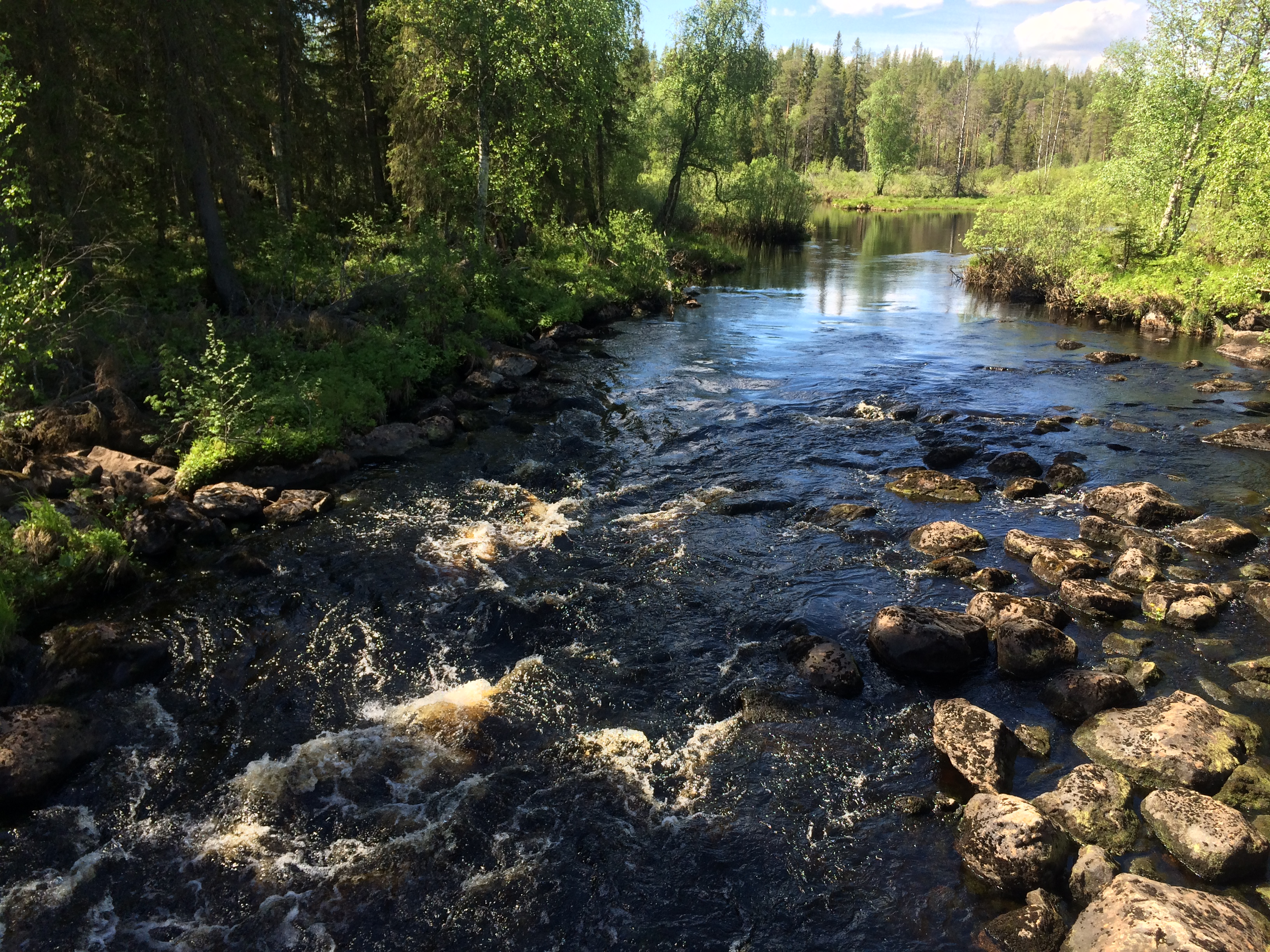 Аррейоки